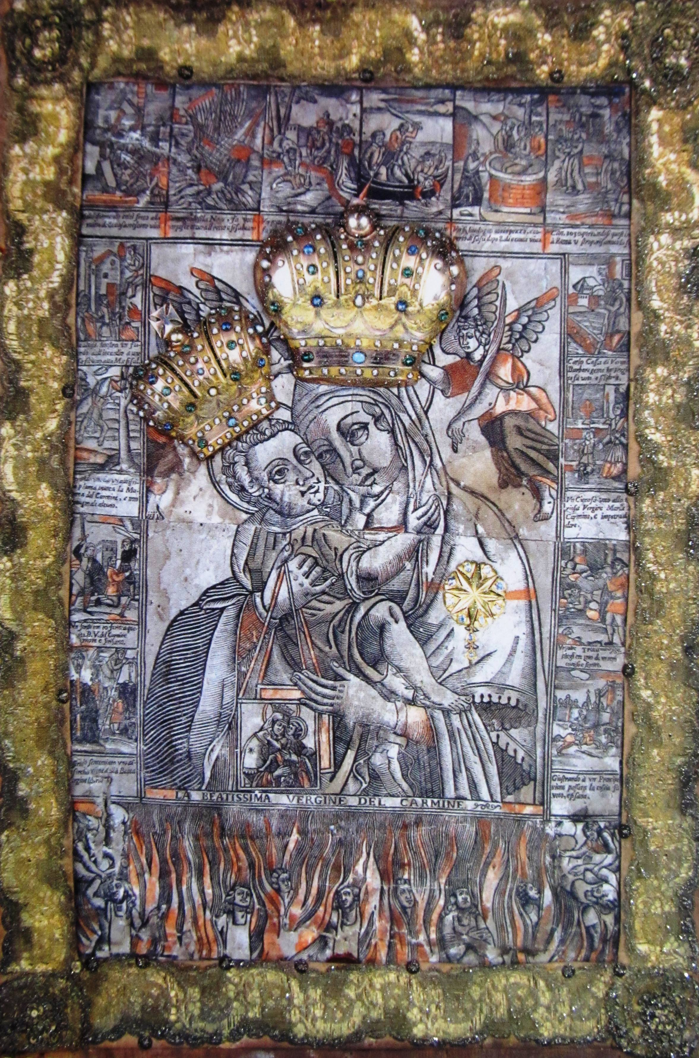 Gnadenbild in der Wallfahrtsbasilika Maria Radna in Lipova, Rumänien.